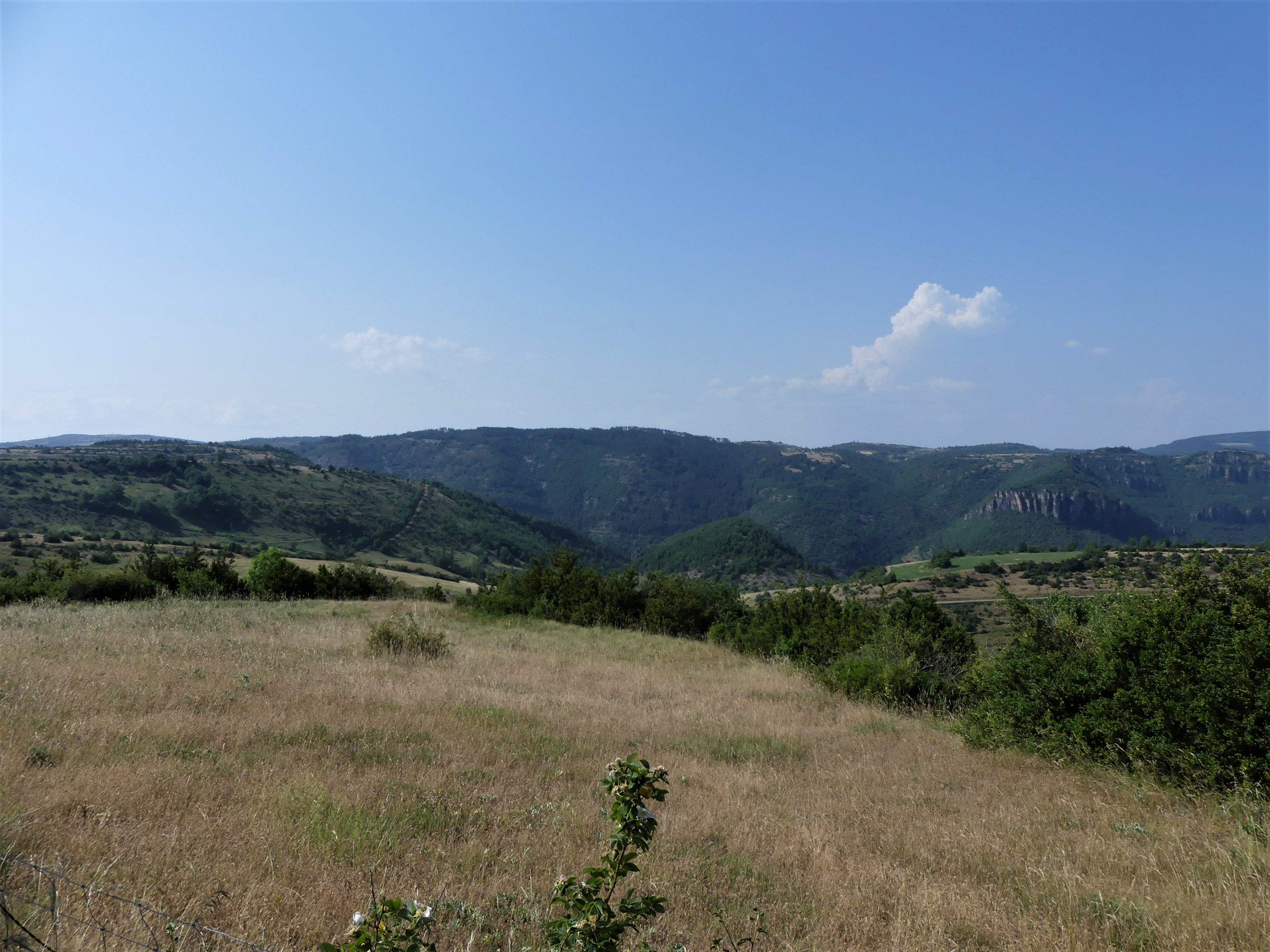 Paysage vu depuis la route départementale 47, au nord-est du col de la Pierre Plantée, Trèves, Gard, France. Au fond, En arrière-plan, la forêt domaniale du causse Noir et les gorges du Trèvezel.